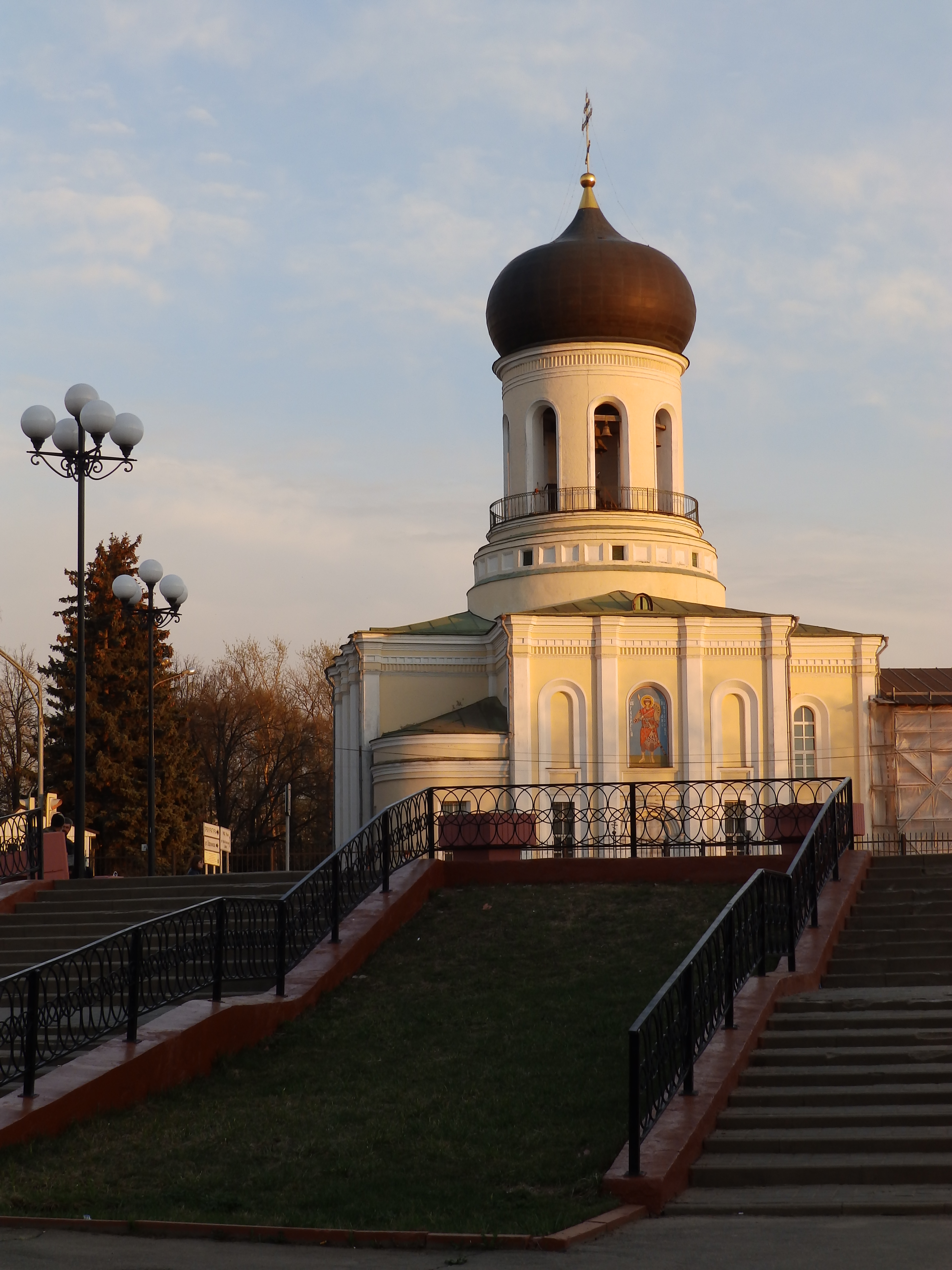 Церковь Николая Чудотворца: площадь Свободы, Рано-Фоминск, Наро-Фоминский район, Московская область